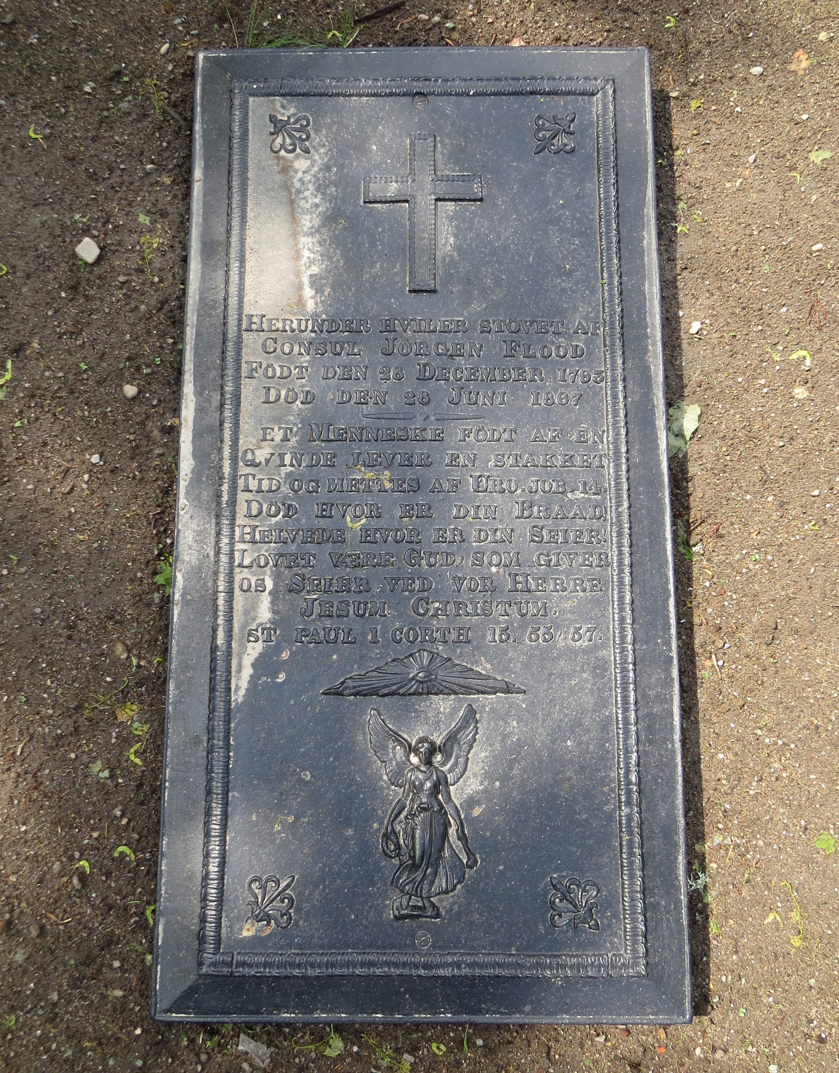 HERUNDER HVILER STÖVET AF CONSUL JÖRGEN FLOOD FØDT DEN 28 DECEMBER 1793 DÖD DEN 28 JUNI 1867. ET MENNESKE FÔDT AF EN KVINDE LEVER EN STAKKET TID OG METTES AF URO. JOB 14. DÖD HVOR ER DIN BRAAD! HELVEDE HVOR ER DIN SEIER! LOVET VÆRE GUD, SOM GIVER OS SEIER VED VOR HERRE JESUM CHRISTUM. ST. PAUL I CORTH. 15. 55/57. Gravminde på Solum Kirkegård ved Skien, Telemarken